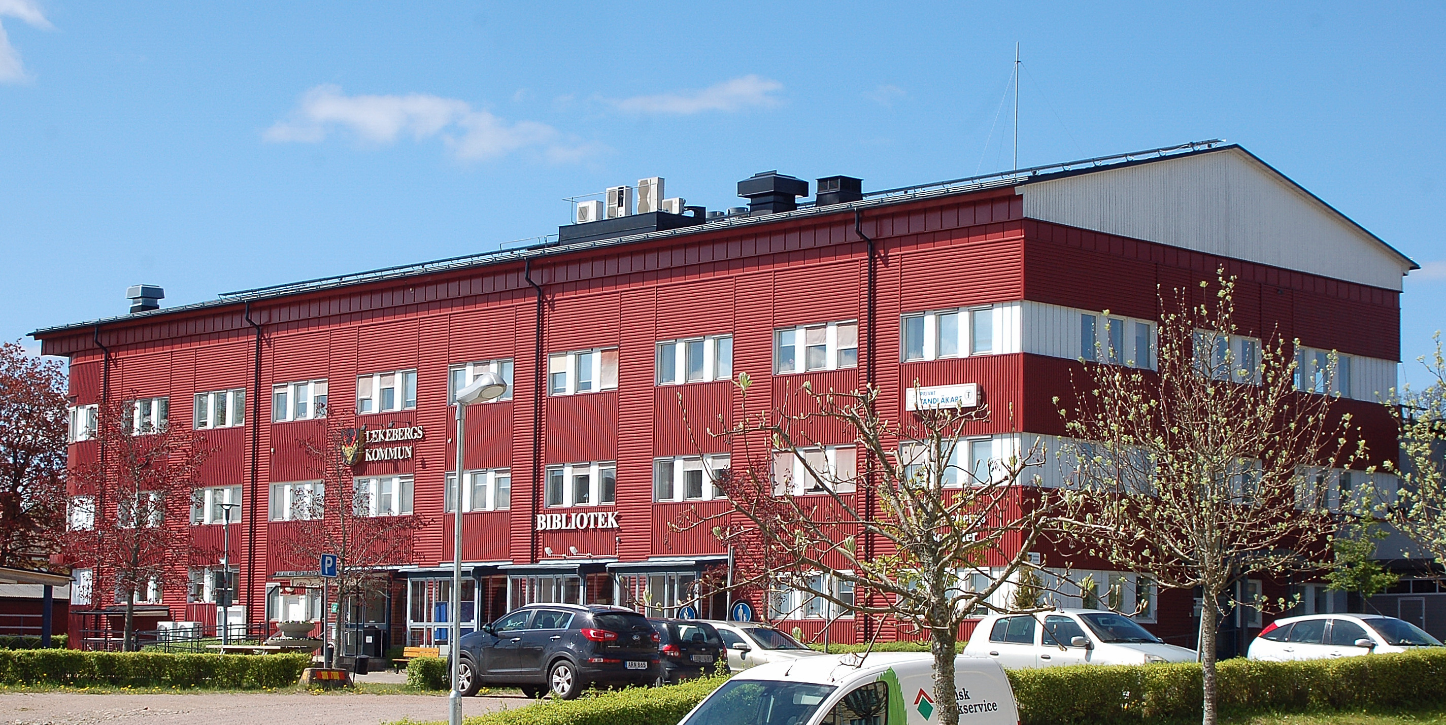 Lekebergs Kommuns Kommunhus i Fjugesta